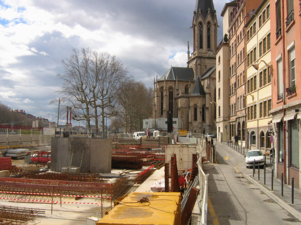 La place Benoît Crépu en travaux à Lyon (Rhône, France).